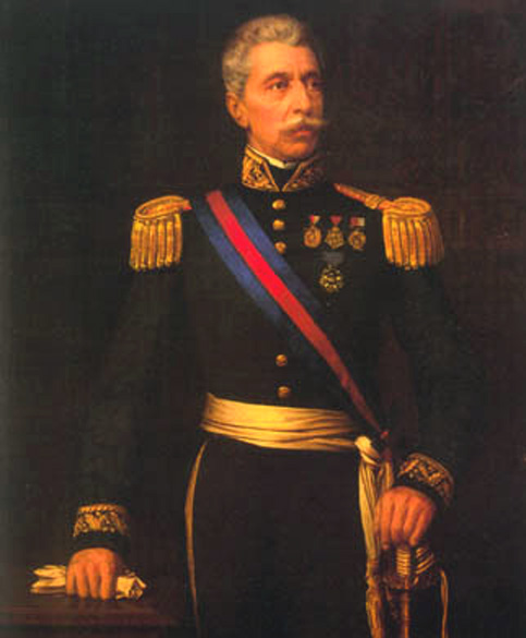 Jose Santiago Aldunate Toro (Chile)